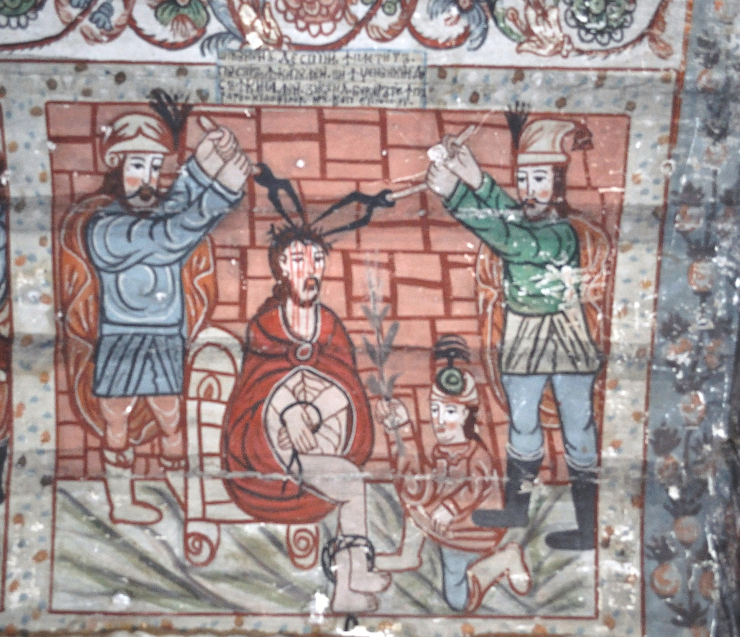 Biserica de lemn din Agârbiciu, județul Cluj